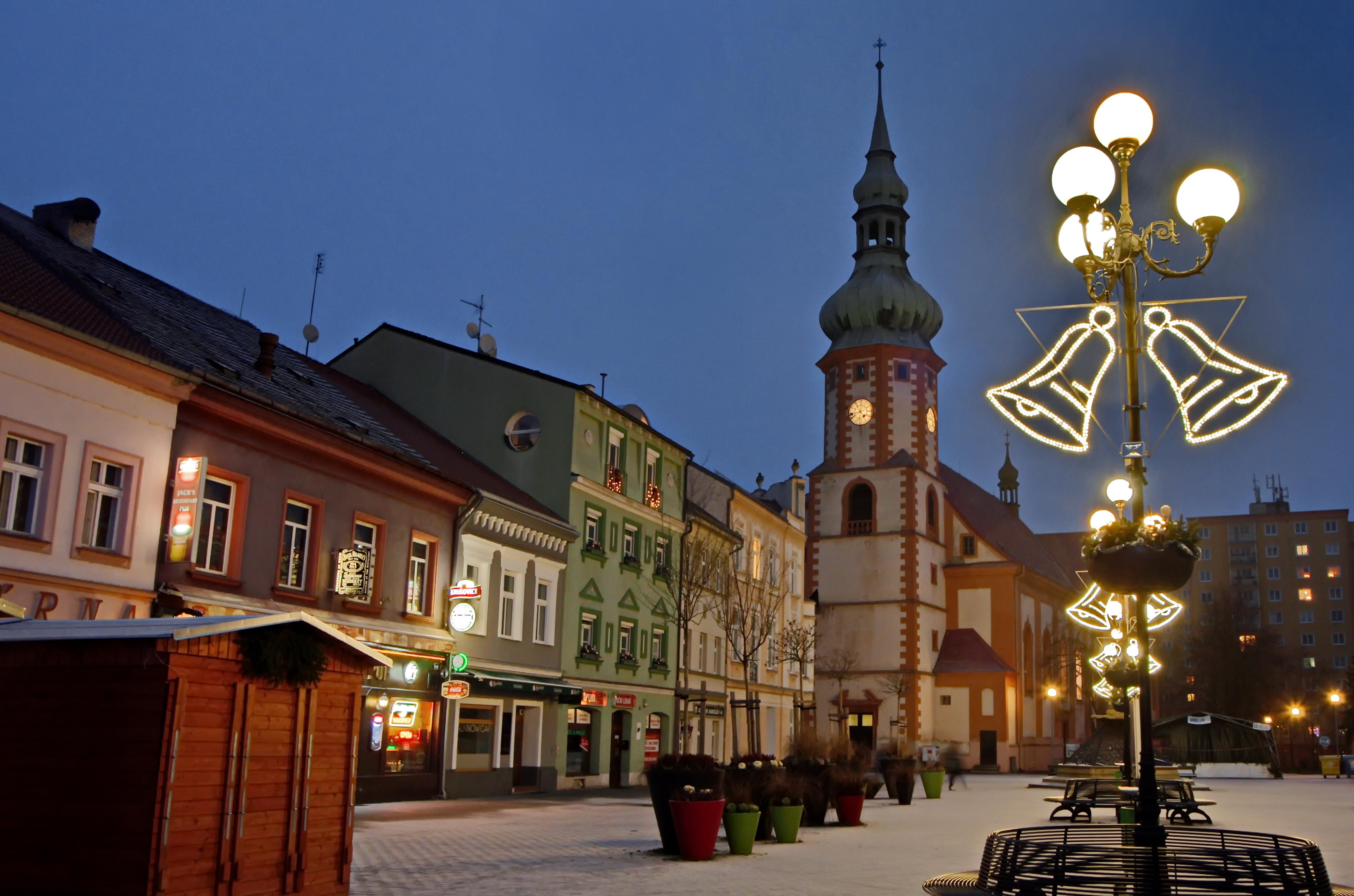 Sokolov, Staré náměstí na silvestra 2015